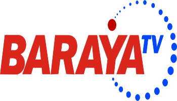 barayatv